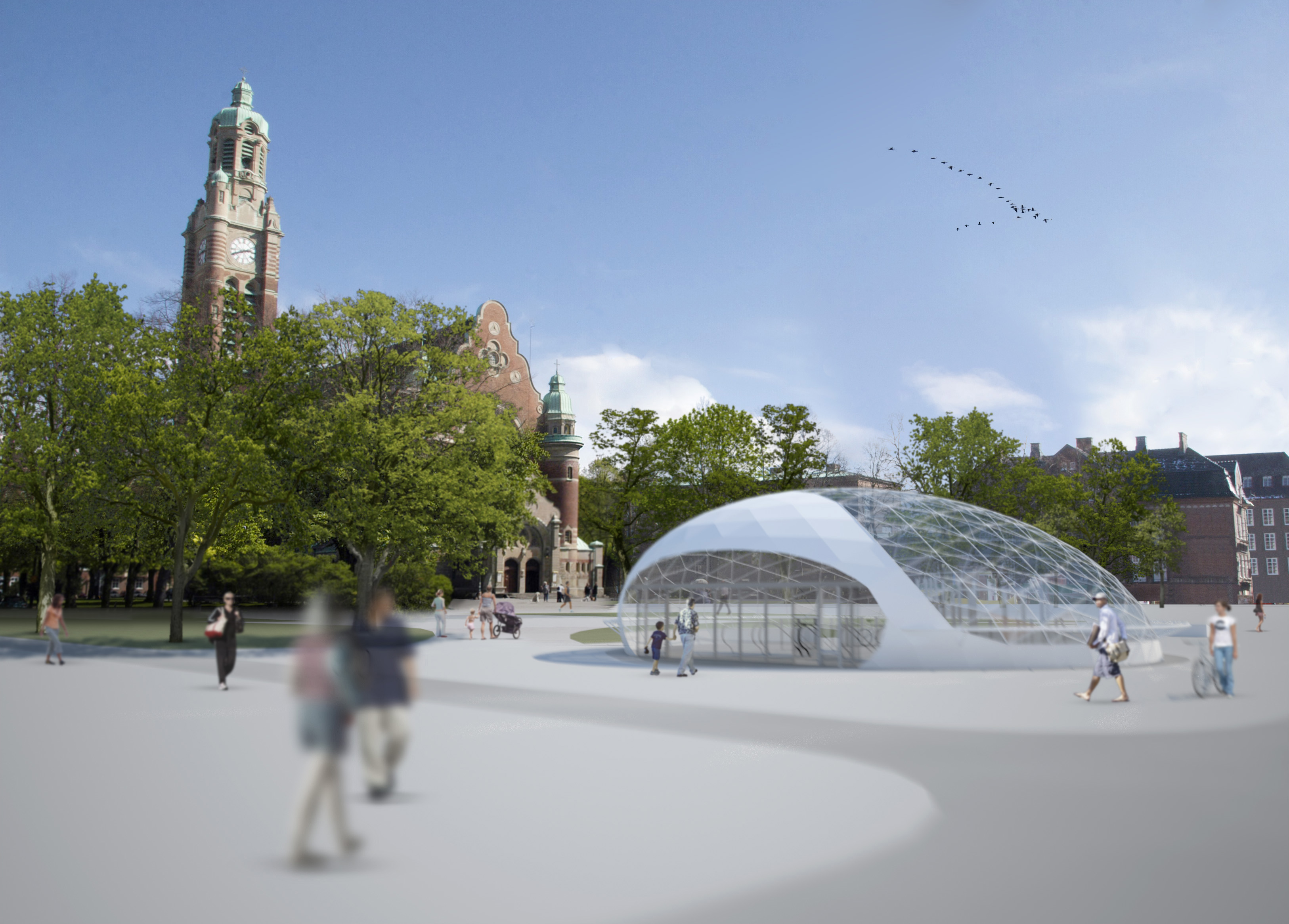 Station Triangeln, norra uppgången, ritad av FFNS/KHRAS arkitekter. I bakgrunden S:t Johanneskyrkan.